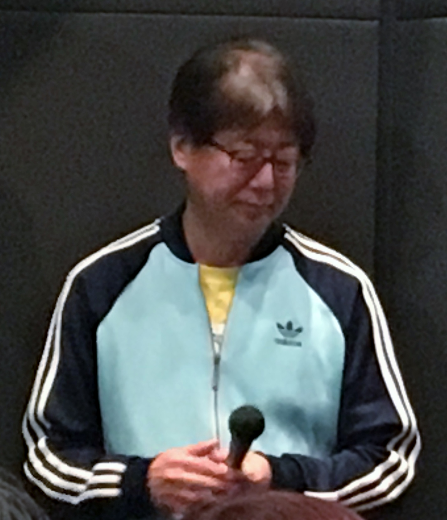 市橋浩治（2018年11月15日、新宿K's cinema） 「あいが、そいで、こい」舞台挨拶にて